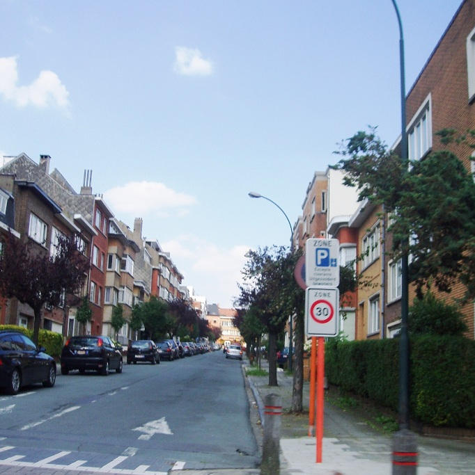 avenue Henri Strauvens Auderghem Belgium